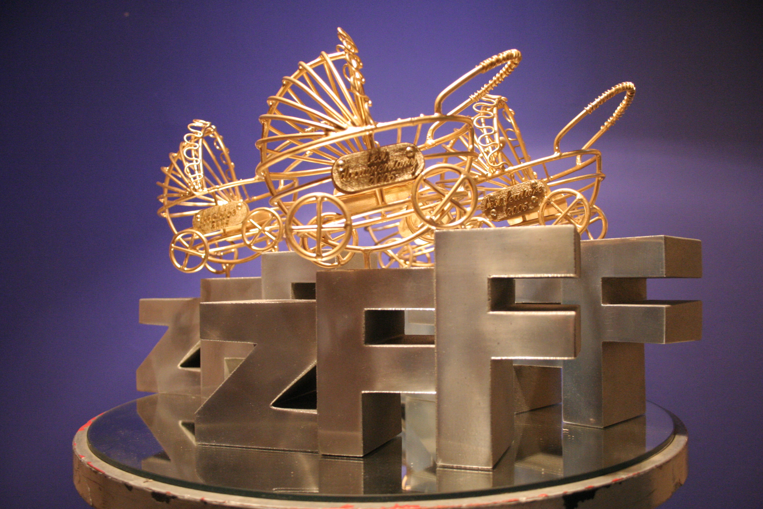 Nagrada "Zlatna kolica" - Zagreb Film Festival